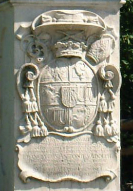 Nepomukstatue bei der Wieshoferbrücke in St. Johann in Tirol, Detail: Wappen des Chiemseer Bischofs Anton von Wagensberg, 1717